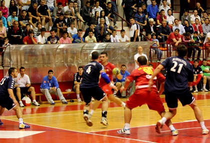 SEHA League Lovćen - Crvena zvezda Belgrade RK Lovćen - RK Crvena zvezda